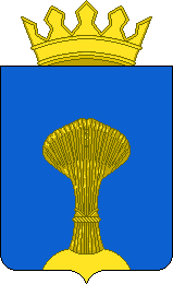 Герб Демянского района Новгородской области